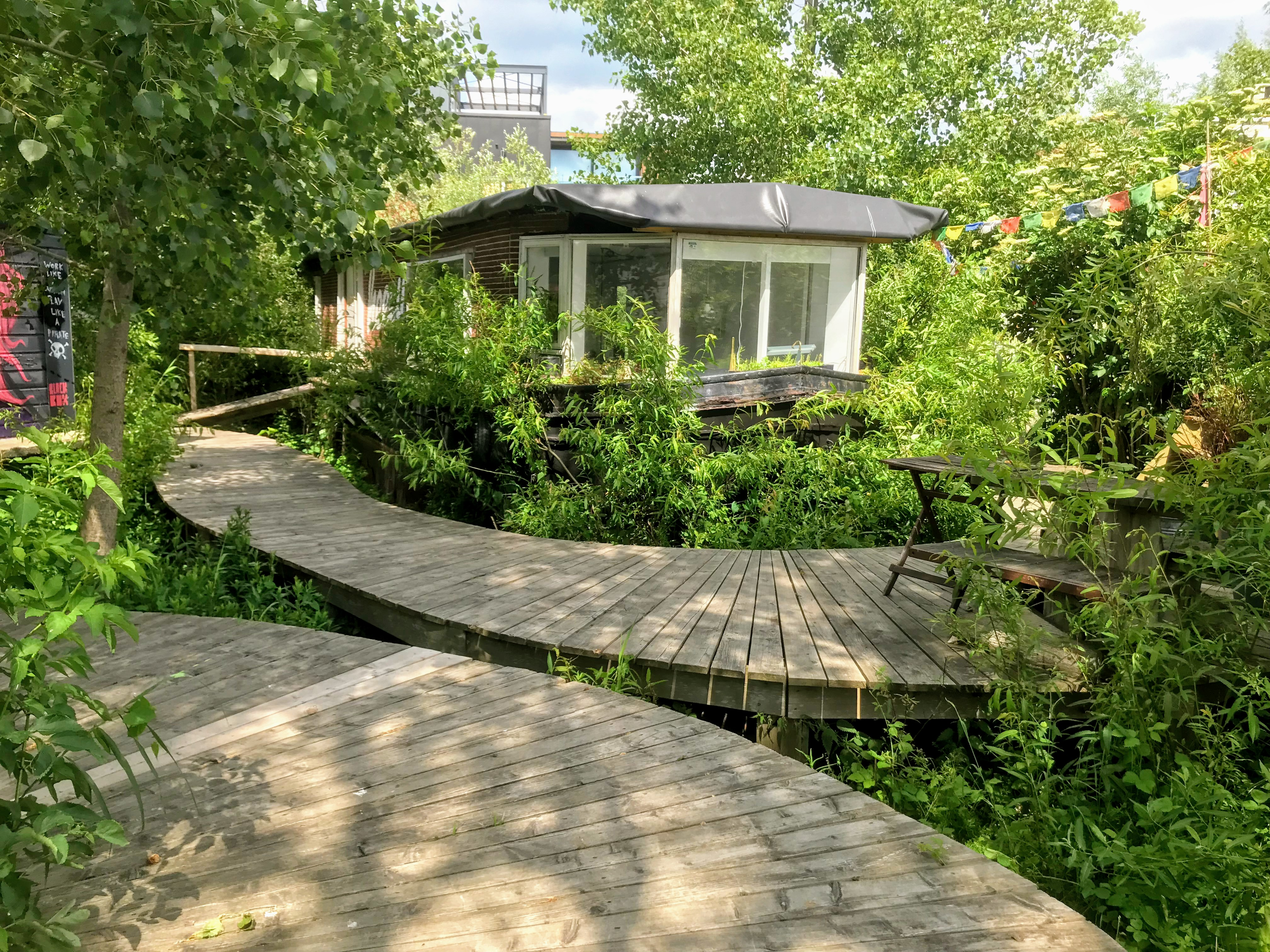 Projektgebiet "De Ceuvel" in Amsterdam-Noord